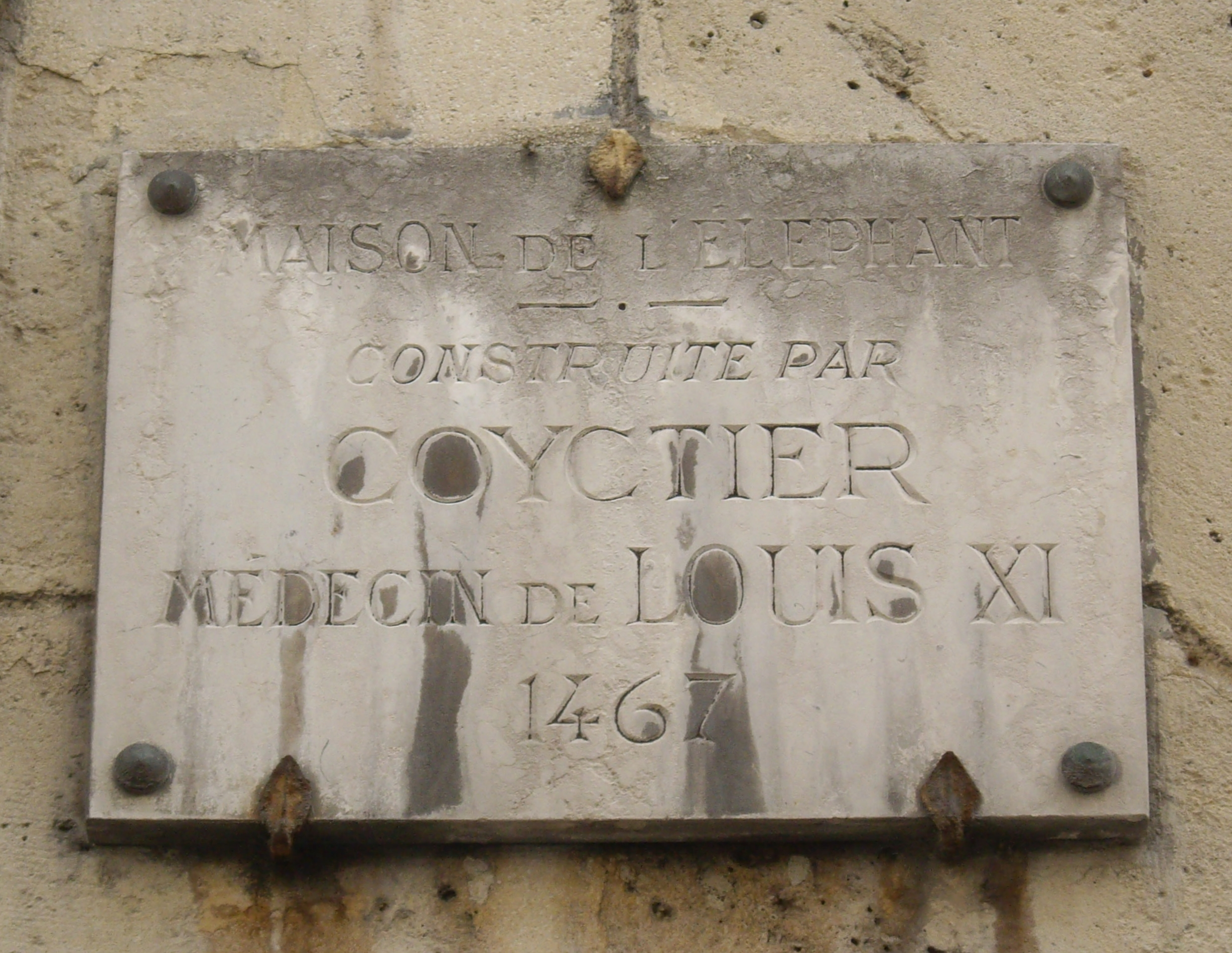 Plaque apposée au n° 51 de la rue Saint-André-des-Arts, Paris 6e, marquant l'emplacement de la « maison de l'éléphant » construite par Jacques Coyctier, médecin de Louis XI, en 1467. Un premier bâtiment sur rue était décoré au-dessus de la porte d'un éléphant chargé d'une tour.